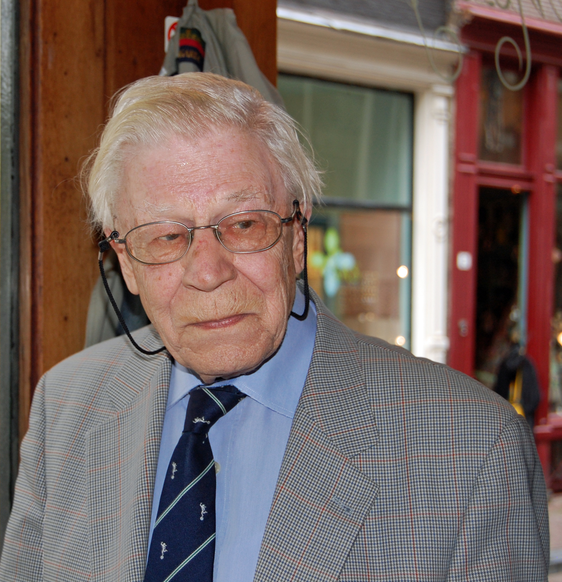 Drs. P (Thun, Zwitserland, 24 augustus 1919), pseudoniem van Heinz Hermann Polzer, is een Nederlandse tekstschrijver, econoom, cabaretier, dichter, schrijver, letterkundige, componist, pianist, en zanger, van eigen Nederlandstalige liedjes.